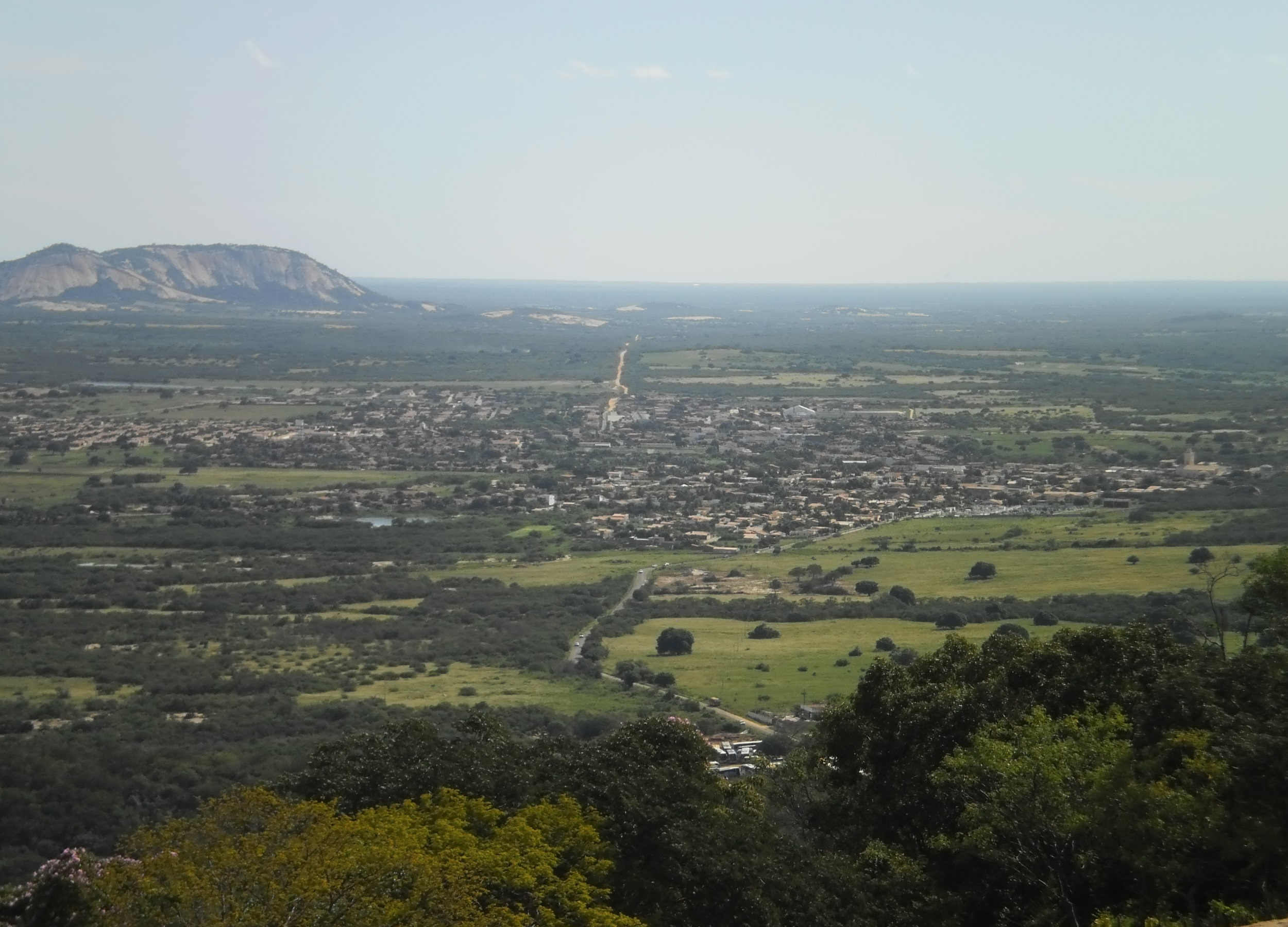 Vista de Patu, Rio Grande do Norte, Brasil, a partir da Serra do Lima.